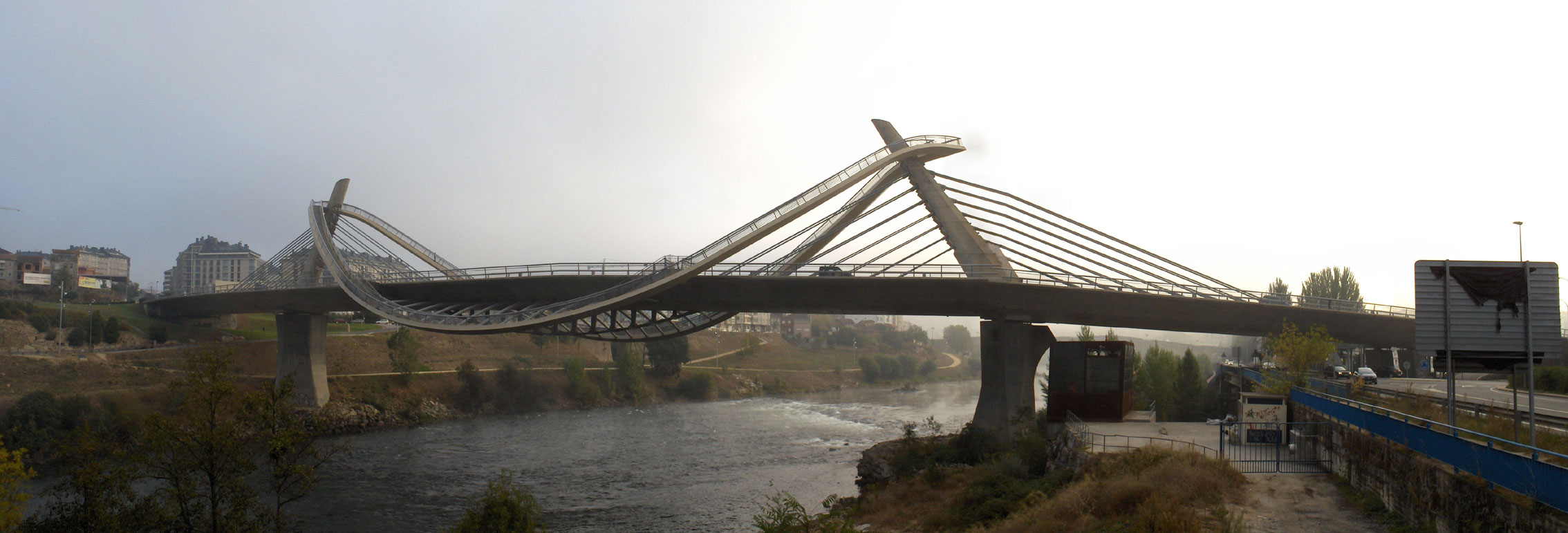 Ponte do Milenio, Río Miño, Ourense, Galicia, España